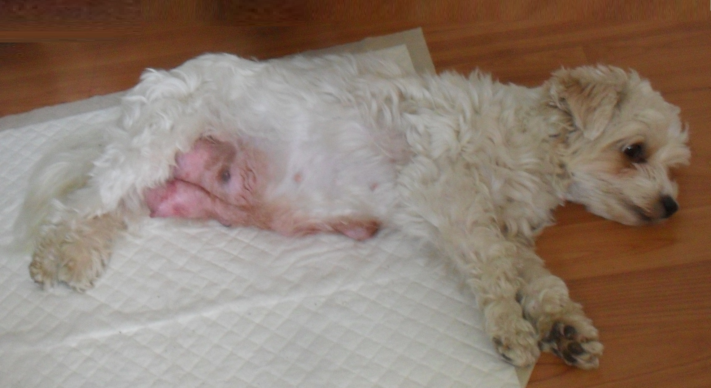 Laktierende Hündin mit strapaziertem Gesäuge.